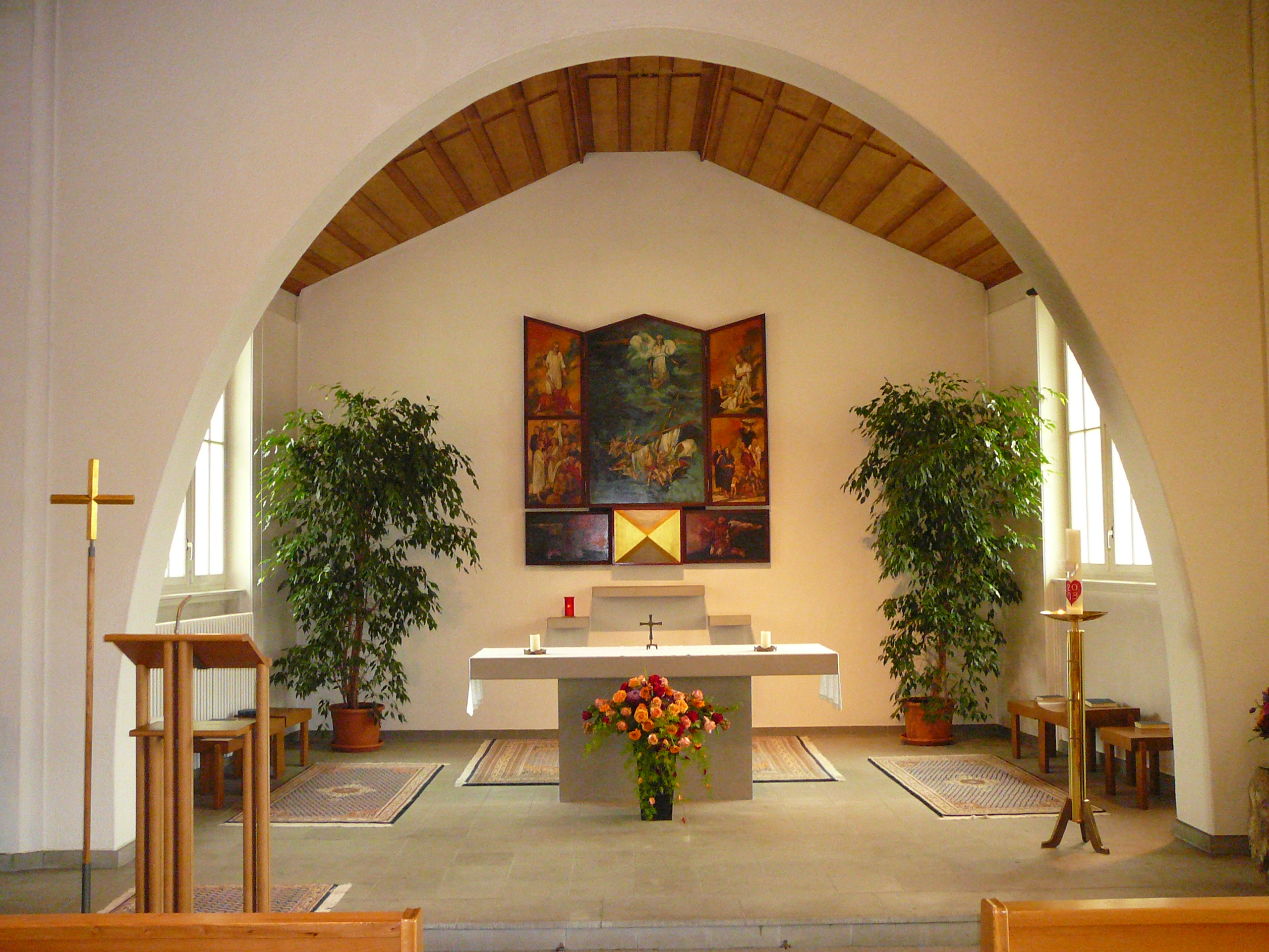 Römisch-katholische Pfarrkirche St. Judas Thaddäus Eglisau, Altarraum von Josef Caminada